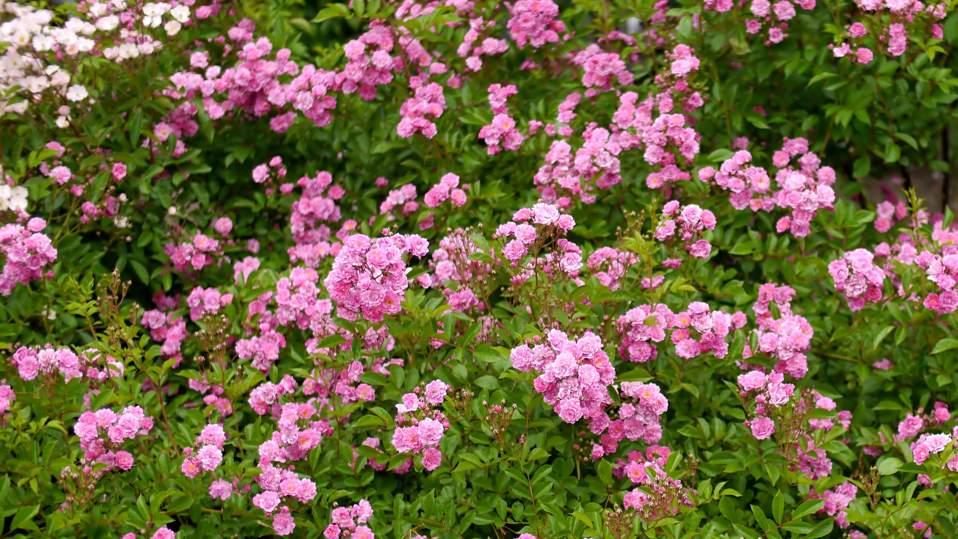 Rose, Wartburg, バラ, ヴァルトブルク, Climbing rose つるバラ Germany ドイツ Kiese 1910